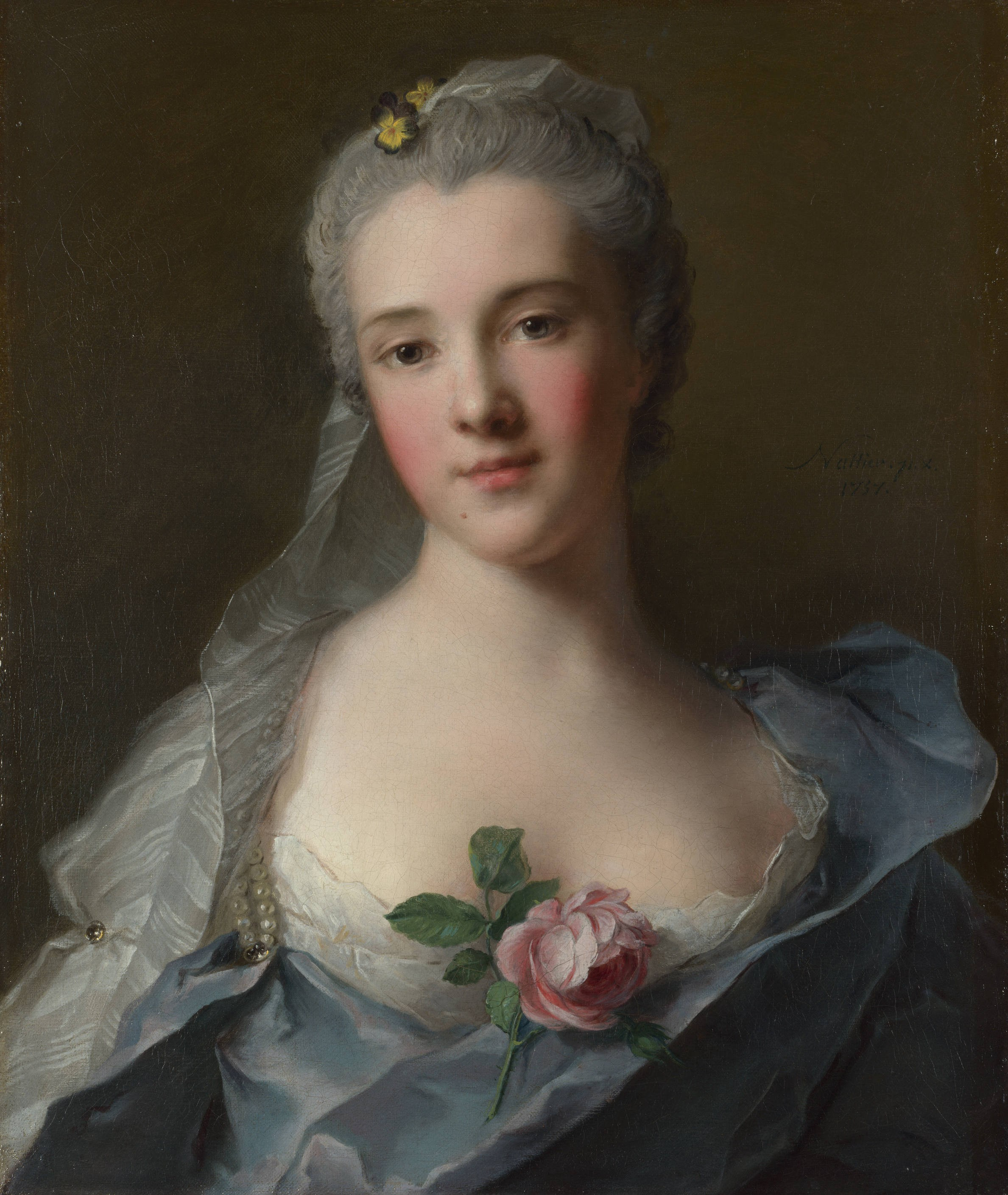 Mlle Marie-Madeleine Balletti (1740–1776), known as Manon Balletti, fiancée (1757–1760) of Giacomo Casanova (1725–1798), wife (1760) of Jacques-François Blondel (1705–1774)